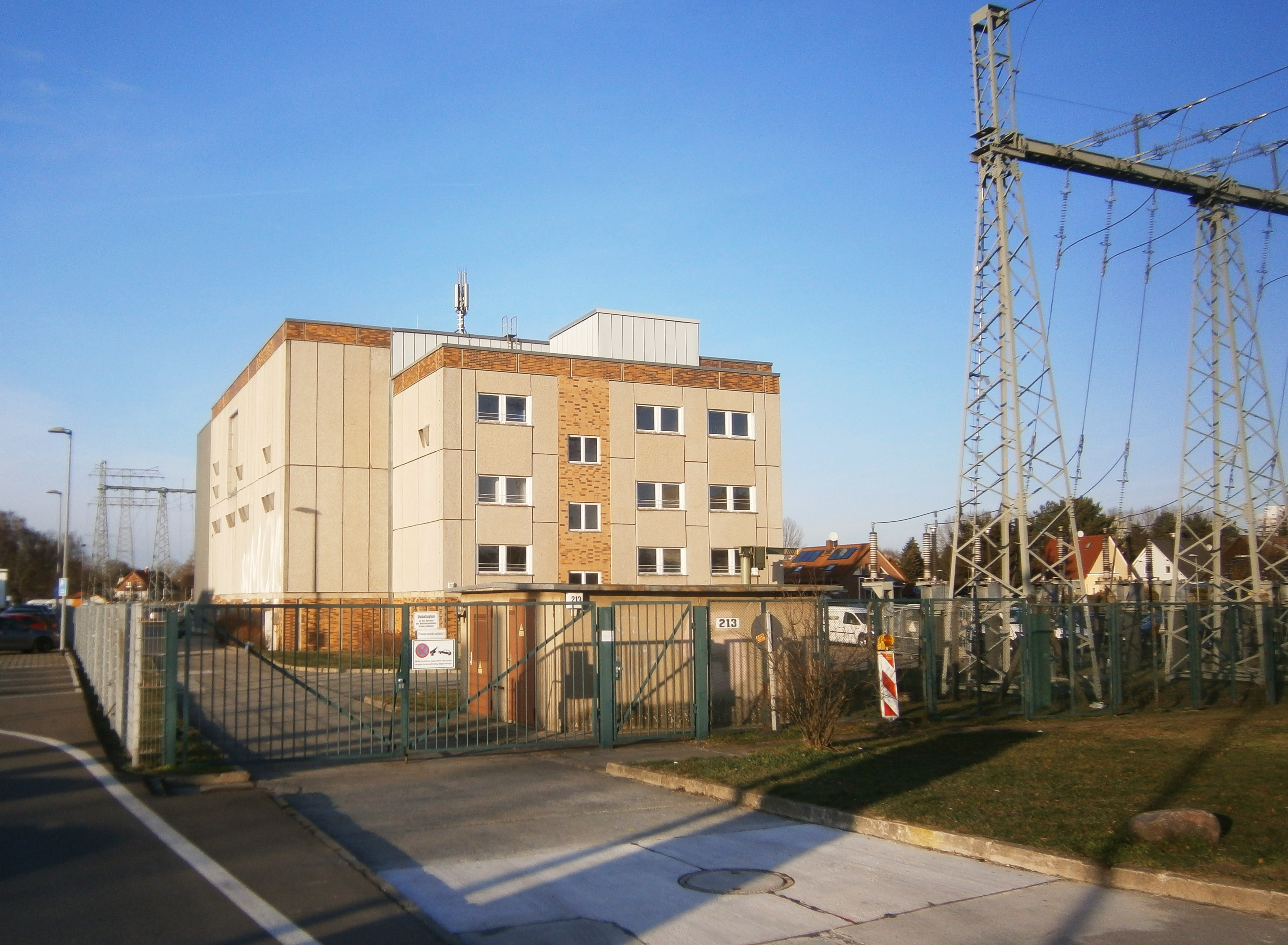 Die Hansastraße ist eine Berliner Straße mit übergeordneter Bedeutung in den Ortsteilen Alt-Hohenschönhausen und Weißensee. Sie liegt zwischen der Indira-Gandhi-Straße und der Großsiedlung Hohenschönhausen-Nord. Auf dem Grundstück Hansastraße 213 steht das Umspannwerk Falkenberger Straße (mit dem alten Straßennamen) an der Ecke Feldmannstraße.